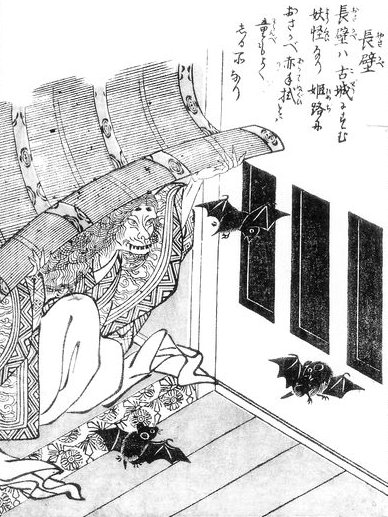 Osakabe (長壁) from the Konjaku Gazu Zoku Hyakki (今昔画図続百鬼)